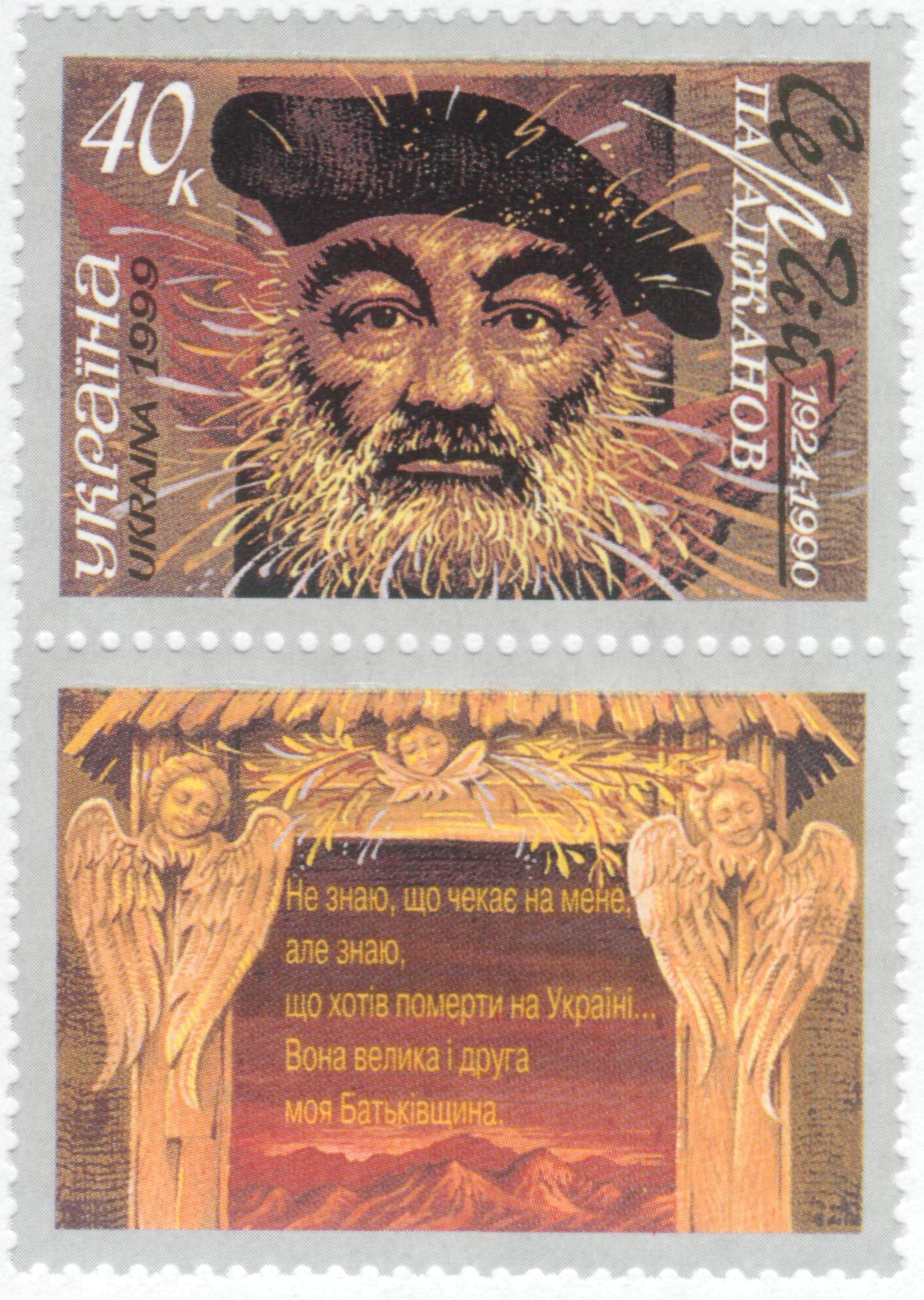 Сергей Параджанов. Марка с вертикальным купоном Украины 1999 года.